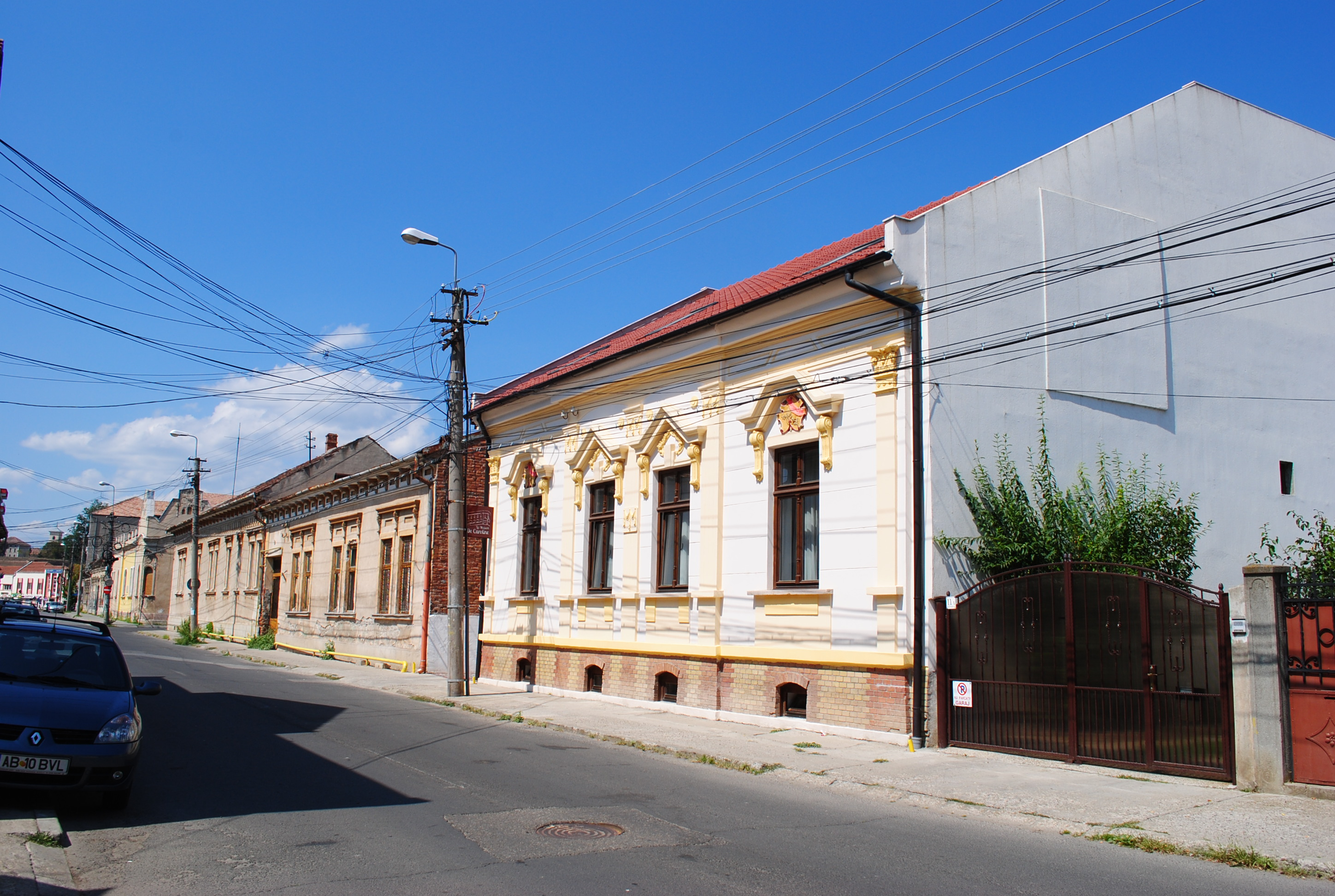 Ansamblul urban, "Str. Primăverii" sf. sec. XIX